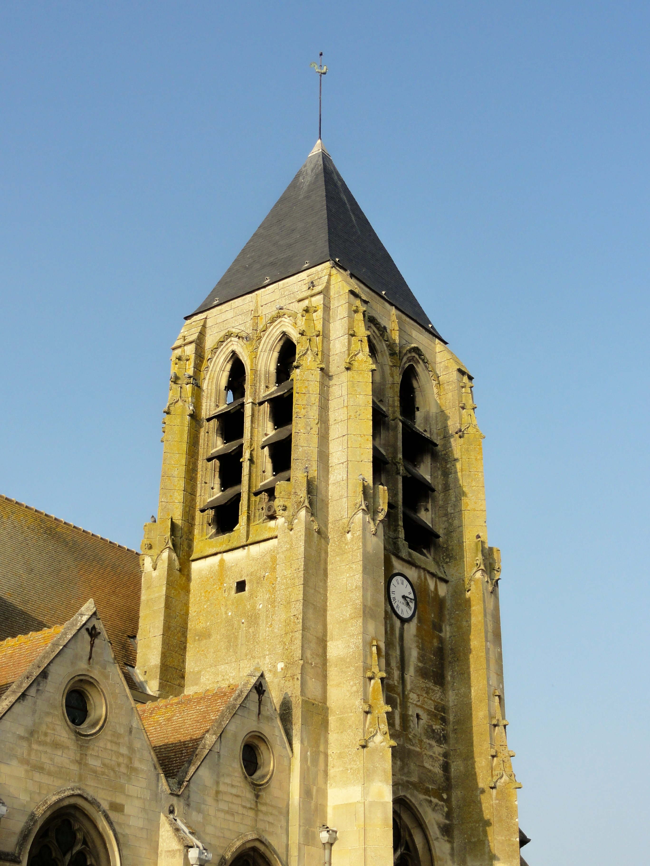 Clocher, étage de beffroi.